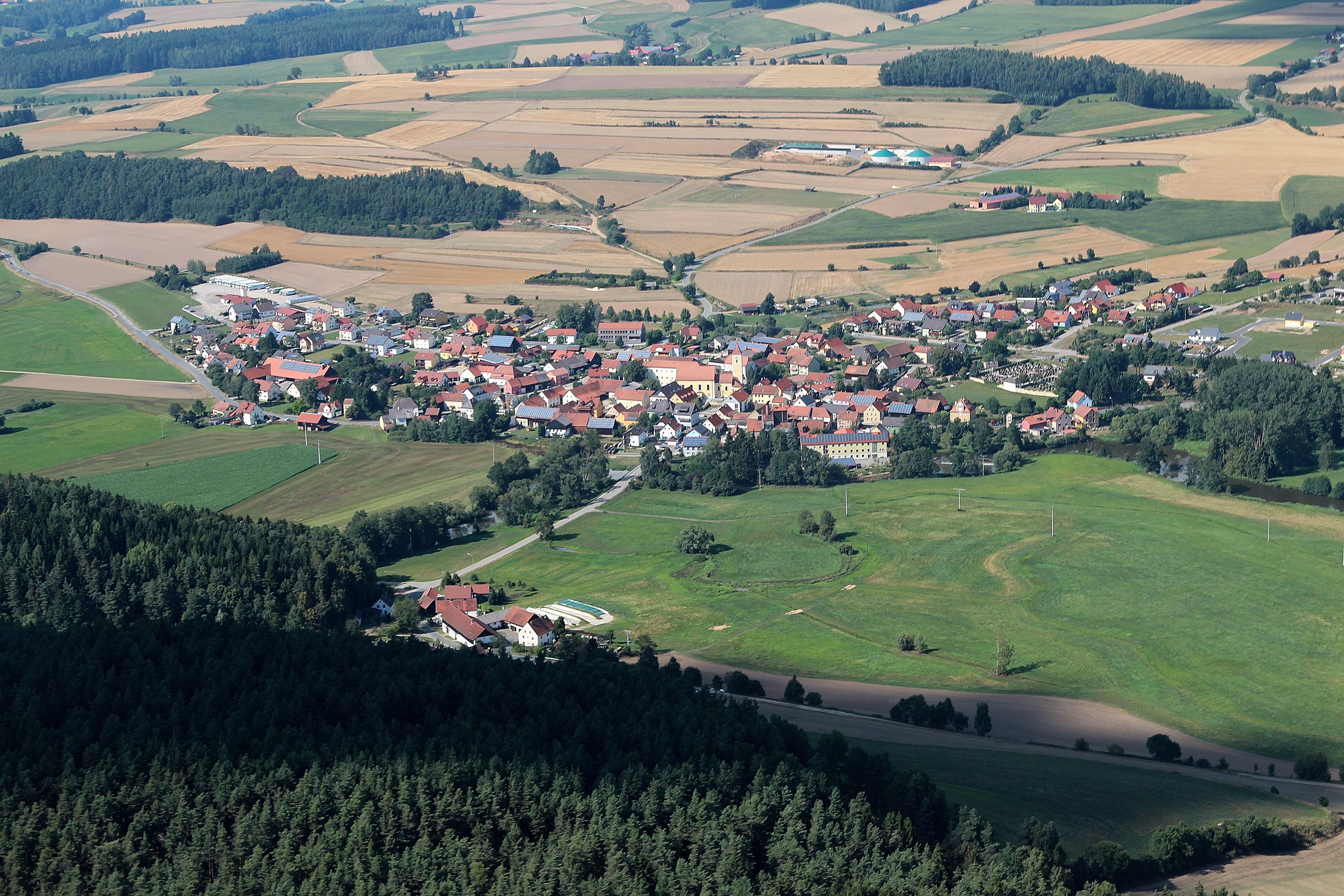 Altendorf, Landkreis Schwandorf, Oberpfalz, Bayern